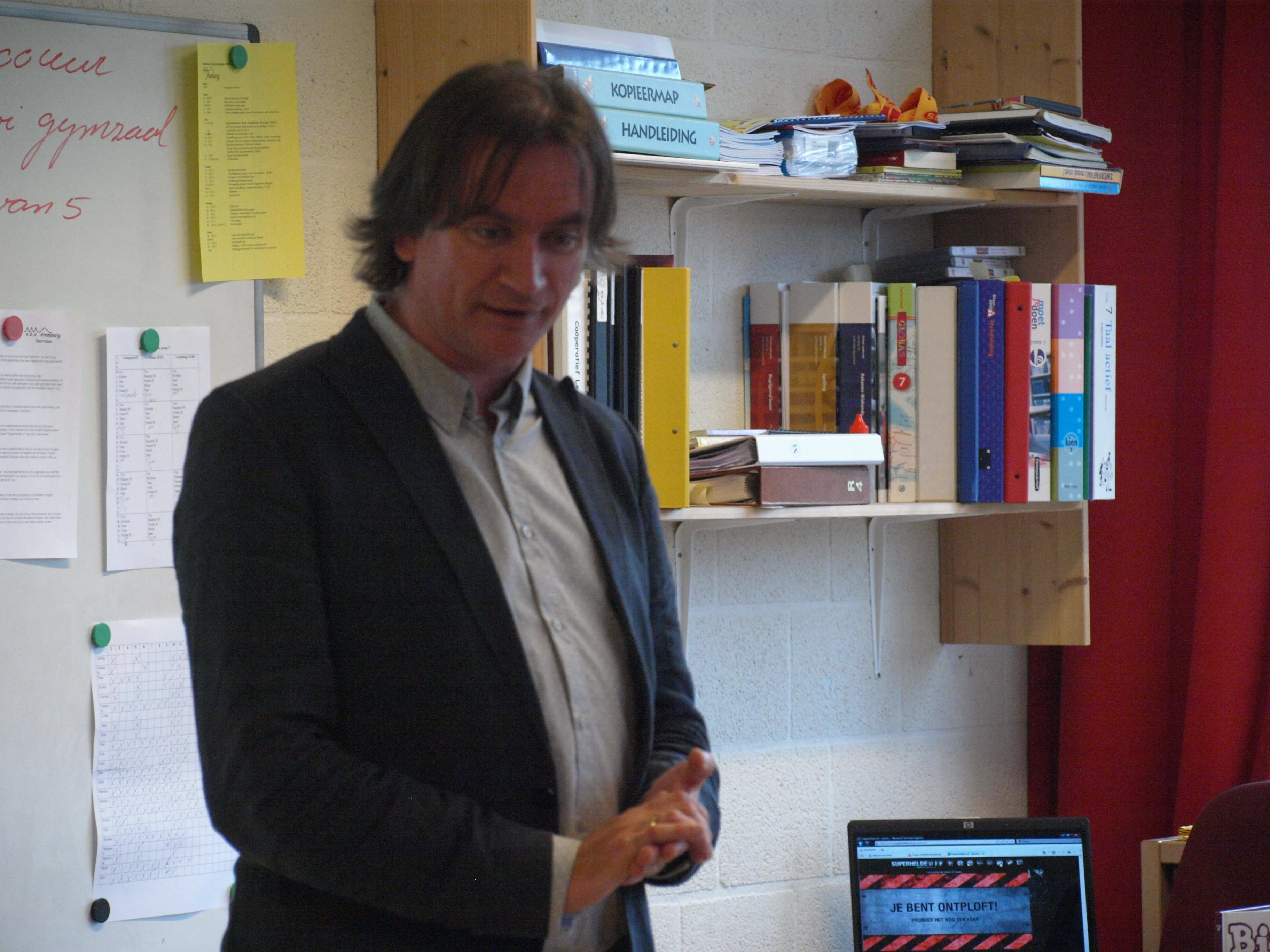 Marcel van Driel op de Arembergschool in Zwartsluis